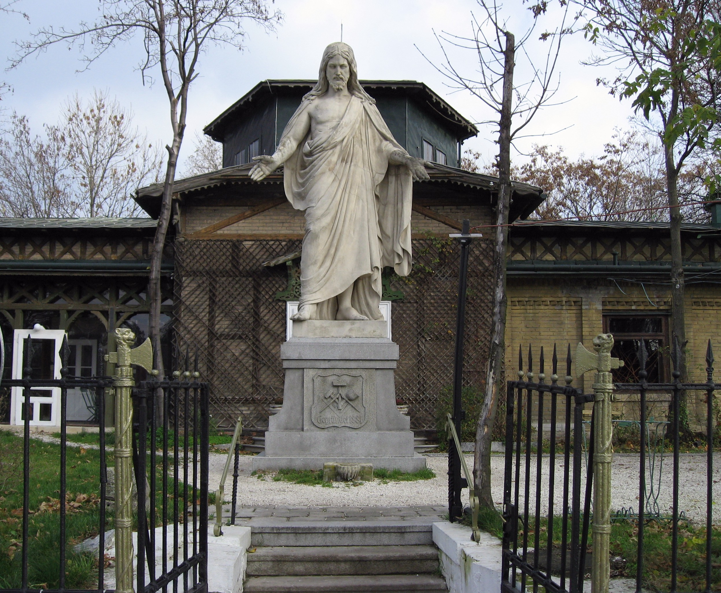 Schloss Concordia, Wien, Christusstatue